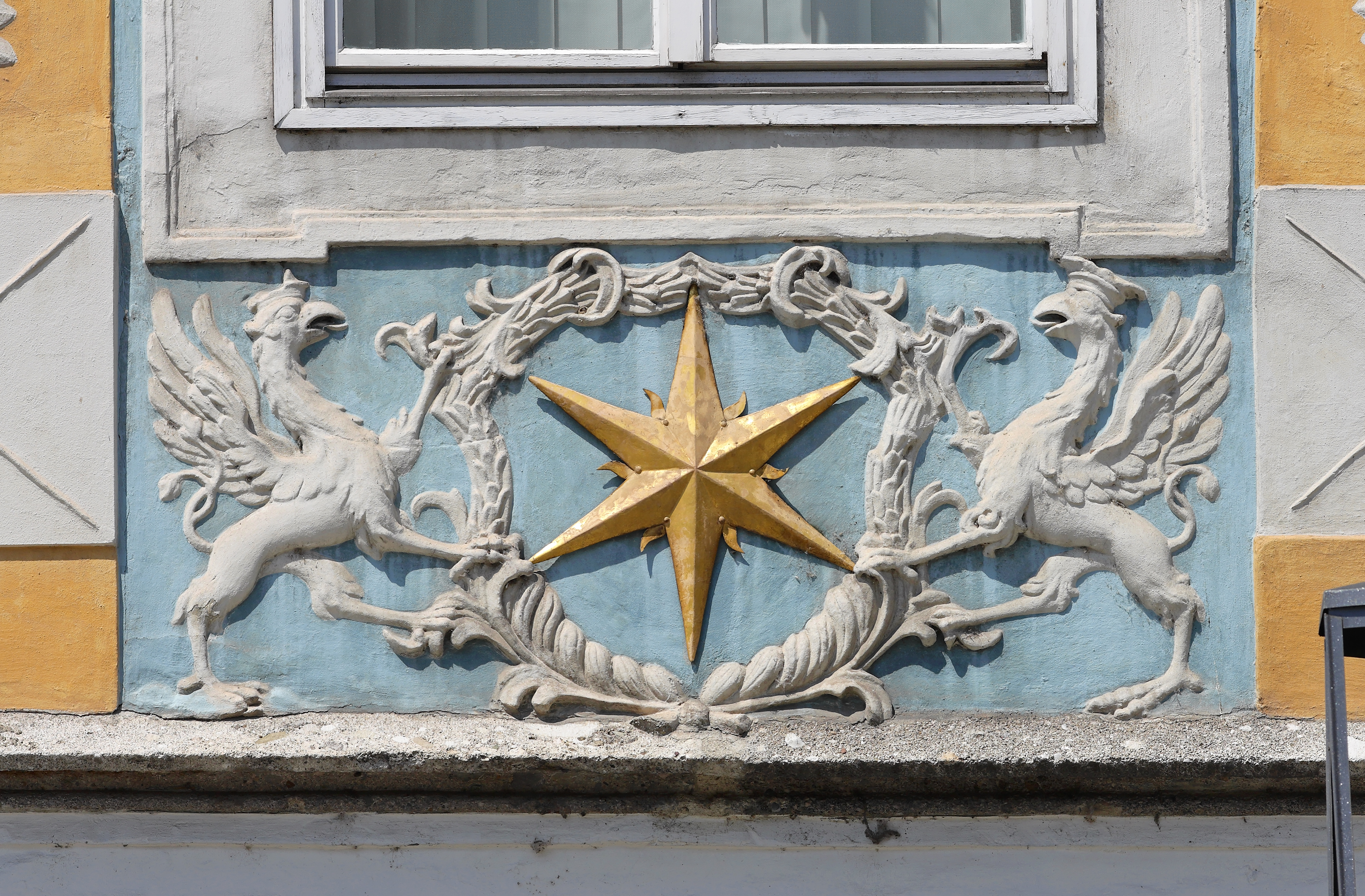 Der namensgebende Stern an der Fassade des Steyrer Sternhauses, gehalten von zwei Greifen